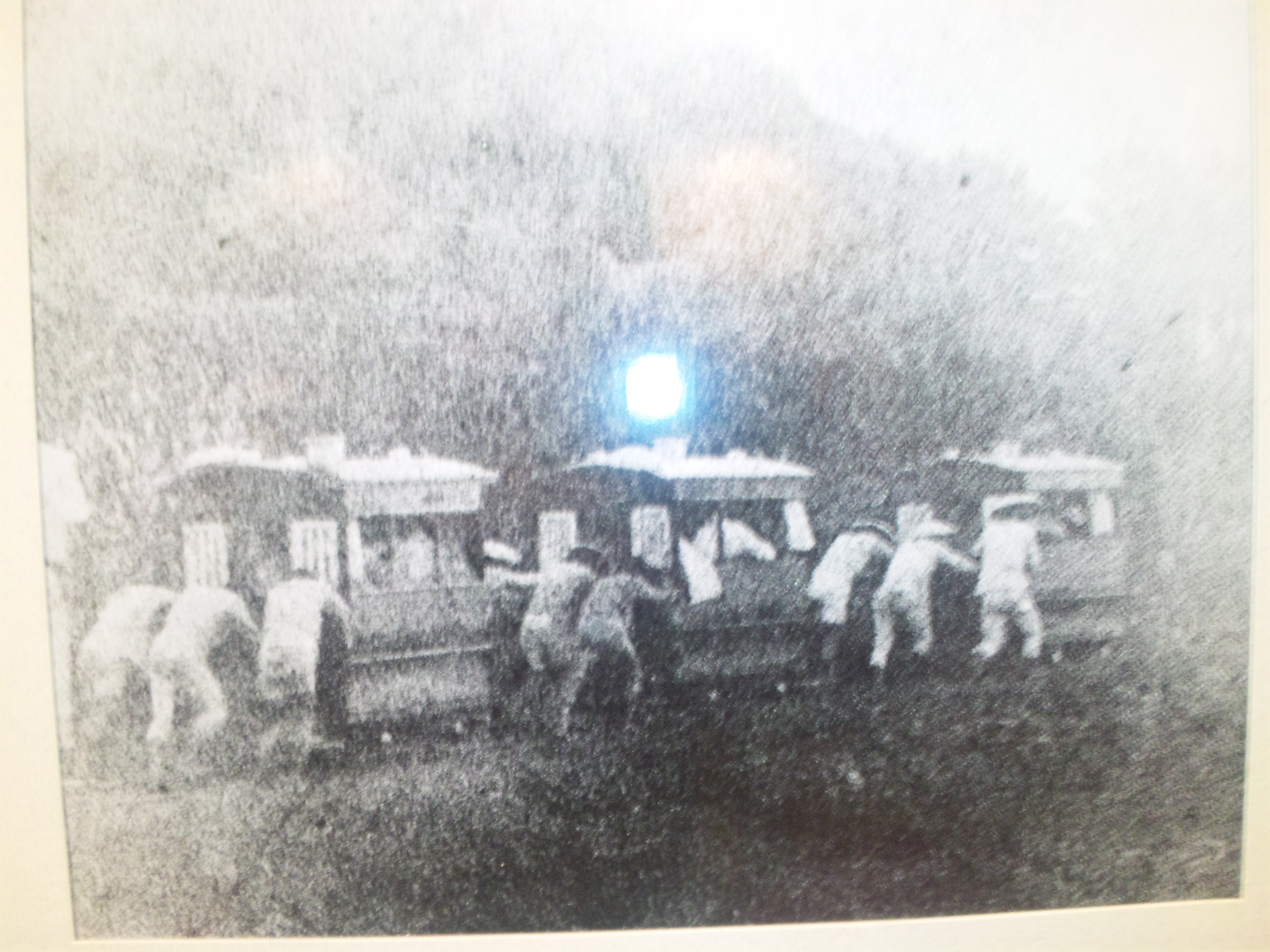 鎌ケ谷市郷土資料館所有